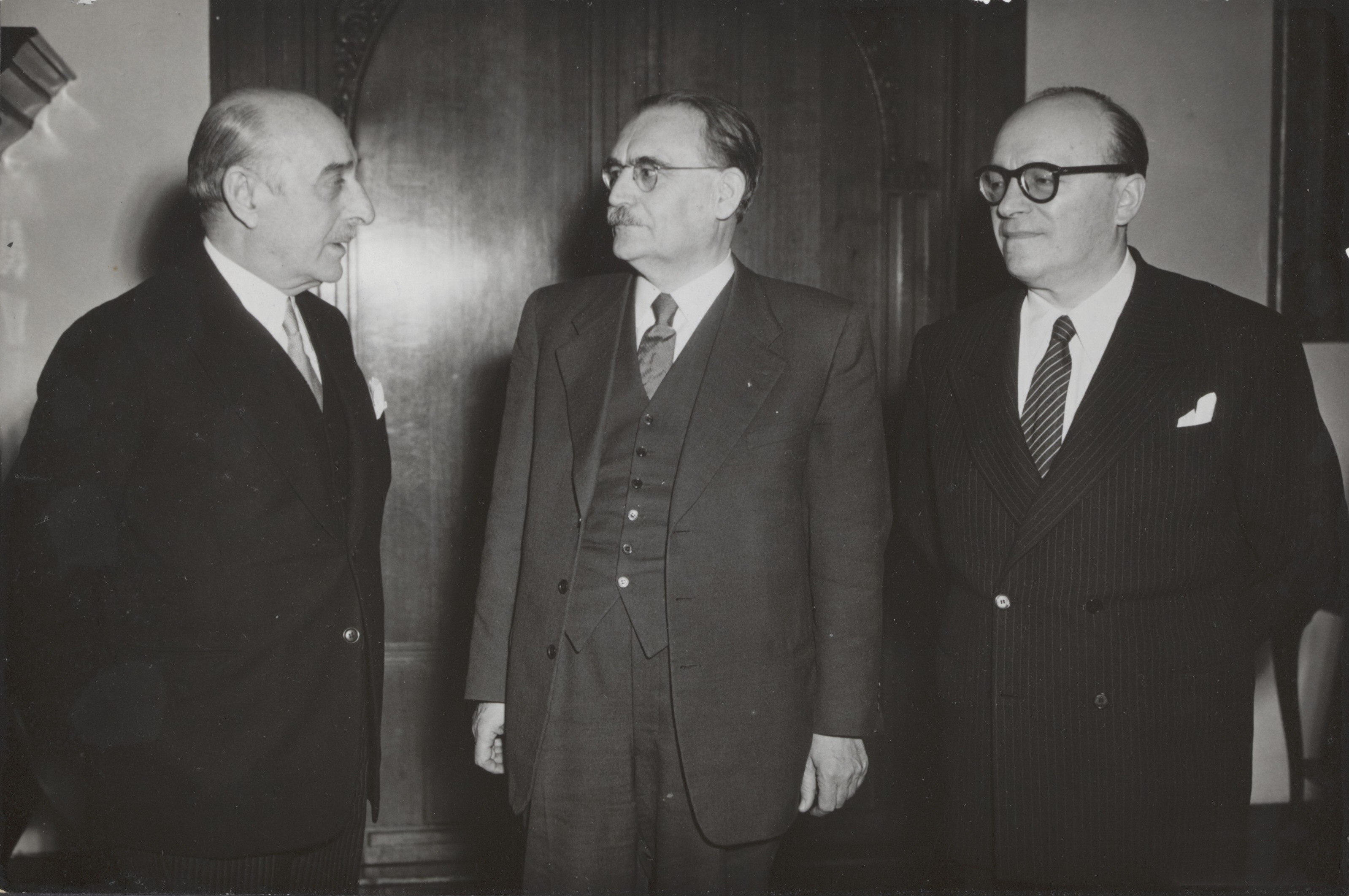 Collectie / Archief : Fotocollectie Elsevier Reportage / Serie : [ onbekend ] Beschrijving : Maarschalk Alexandros Papagos (links), premier van Griekenland, ontvangen door minister-president dr. W. Drees (midden). Rechts de Griekse minister van Buitenlandse Zaken Stephanopoulos Datum : 2 februari 1954 Locatie : Den Haag, Griekenland Trefwoorden : bezoeken, ministers, ontvangsten, premiers Persoonsnaam : Drees W, Papagos Alexandros, Stephanopoulos Fotograaf : Duinen, […] van / Anefo Auteursrechthebbende : Nationaal Archief Materiaalsoort : Foto (zwart/wit) Nummer archiefinventaris : bekijk toegang 2.24.05.02 Bestanddeelnummer : 091-0891